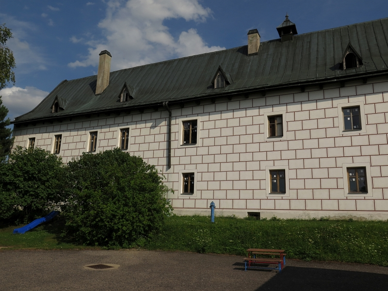 Zámek Koldín, Koldín 1, Koldín.